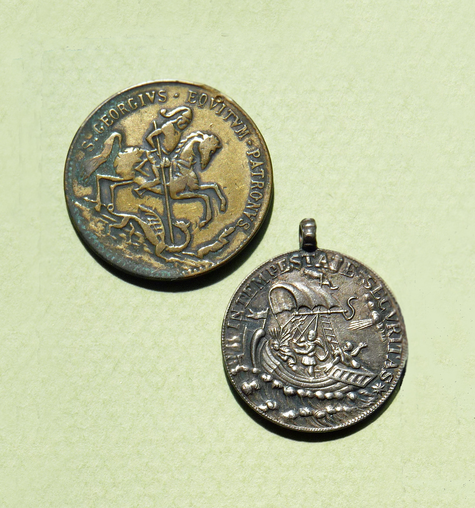 Médailles de saint Georges, protection contre les balles de fusil. Musée sundgauvien